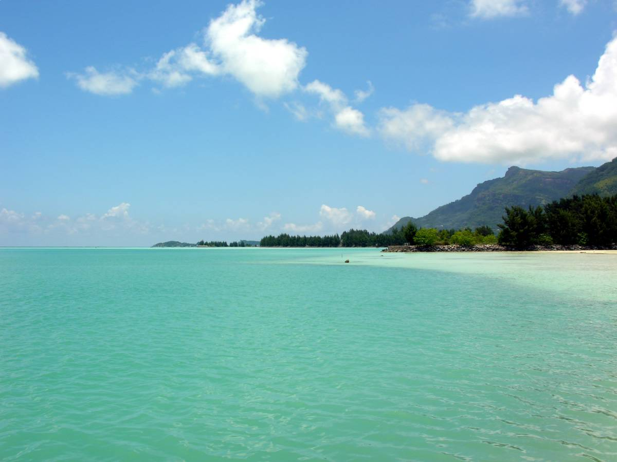 Seychelles, Mahé Island